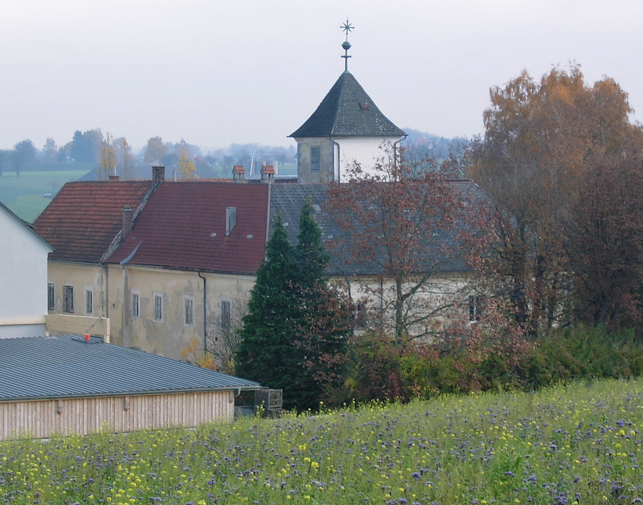 Pfarrkirchen bei Bad Hall Schloss Mühlgrub Mühlgruber Straße 42, Nordwestansicht